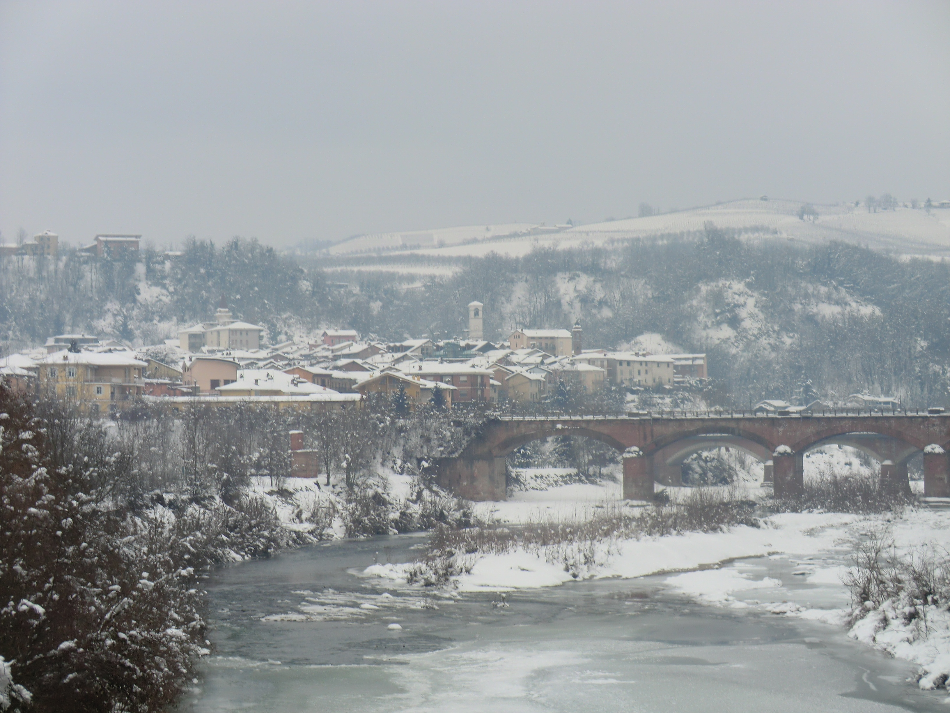 Farigliano: fiume Tanaro e ponte Ex ferrovia Bra - Bastia Mondovì - Ceva